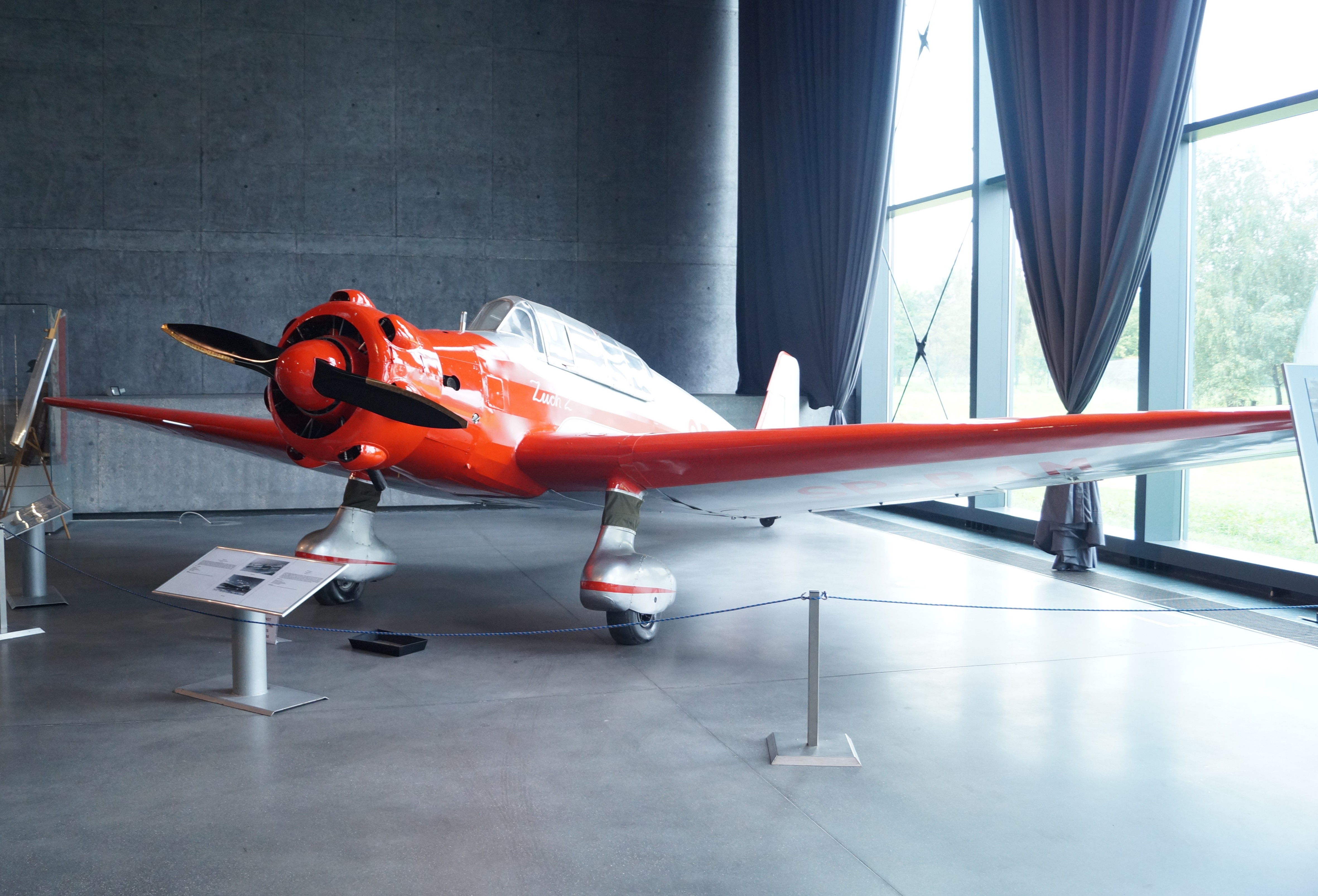 This photo was taken during Automotive Wikiexpedition 2016 set up by Wikimedia Polska Association.You can see all photographs in category Wikiekspedycja motoryzacyjna 2016. English | Polski | +/− LWD Zuch 2 w Muzeum Lotnictwa Polskiego w Krakowie